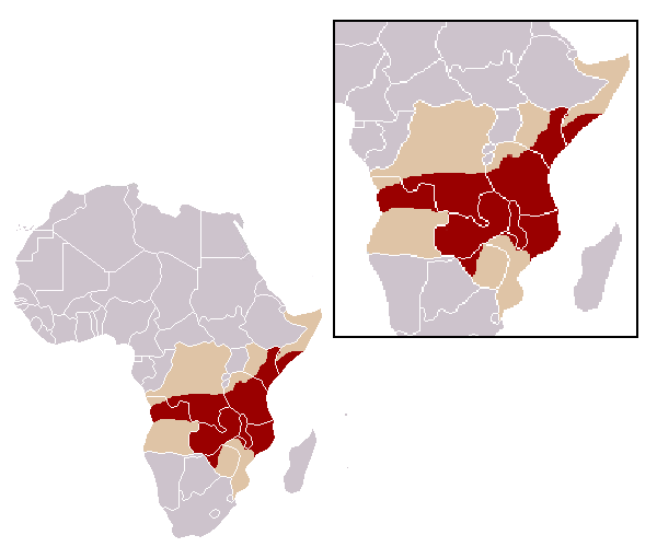 Papio cynocephalus range